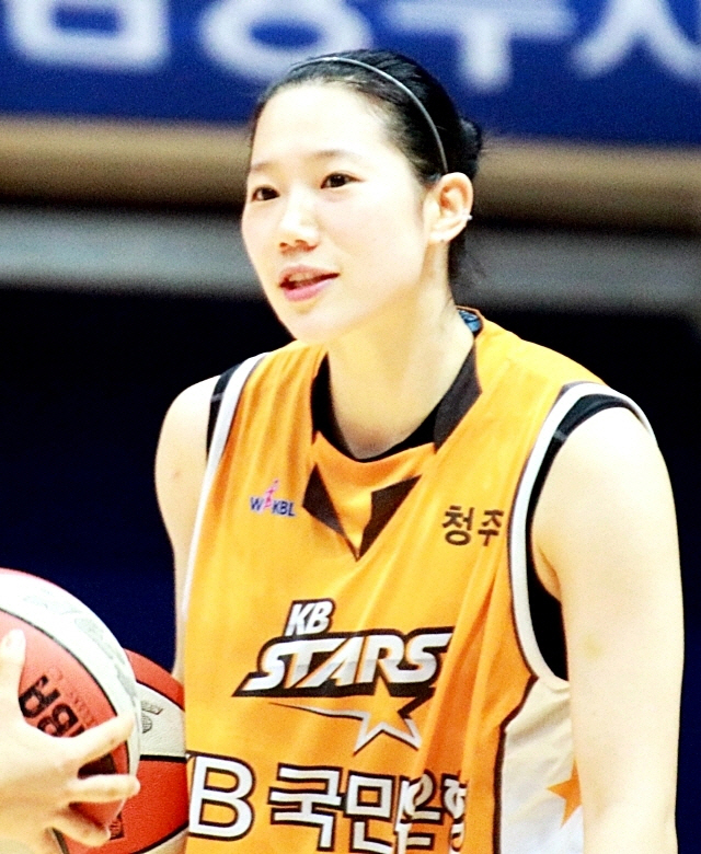 160217 여자농구 신한은행 vs KB스타즈 직찍 2